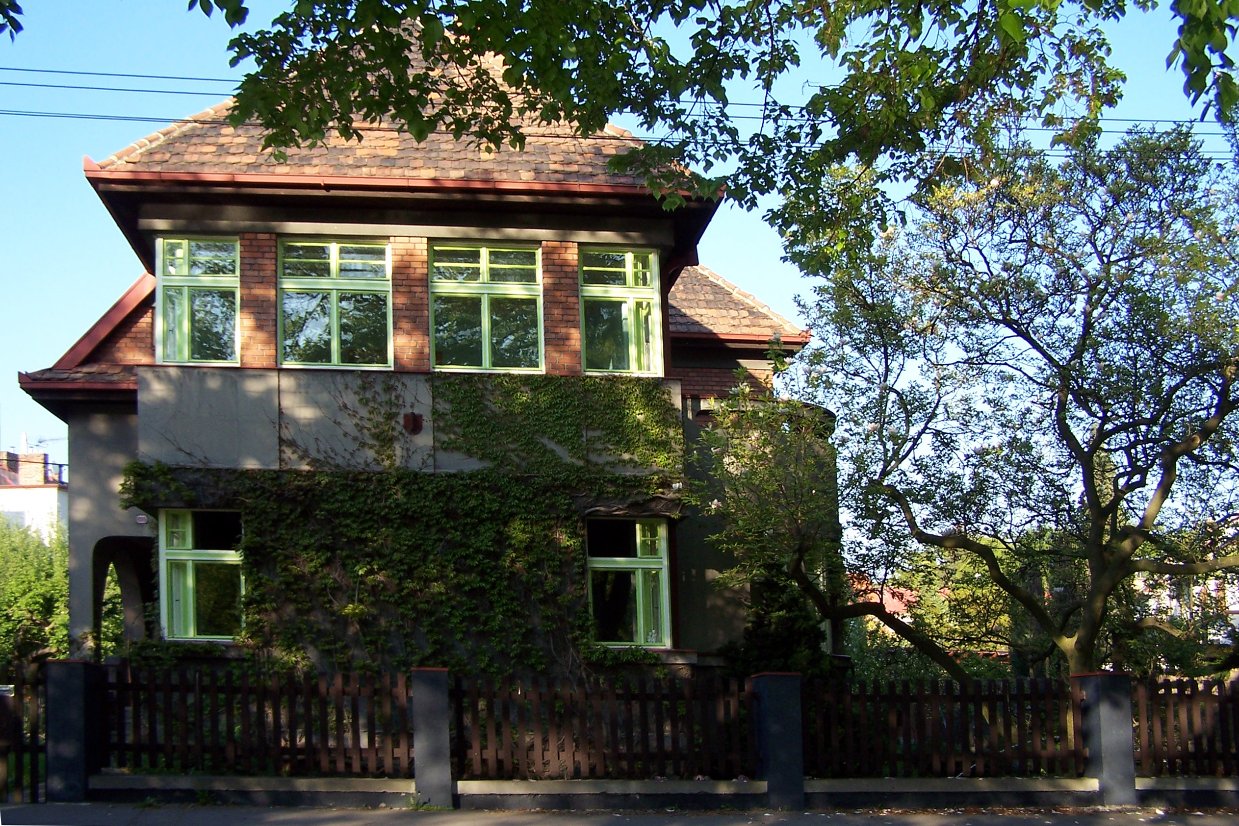 Křížova vila v Bulharské ulici. Architekt Karel Řepa. Dům byl postaven v r.1925 ve stylu funkcionalistické a konstruktivistické moderní architektury. Dům zapsán na seznamu kulturních památek České republiky.